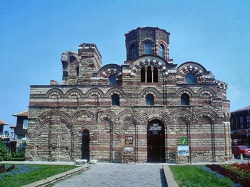 Pantokrator Kerk. Nesebar, 2005. Foto: Jeffrey De Keyser.